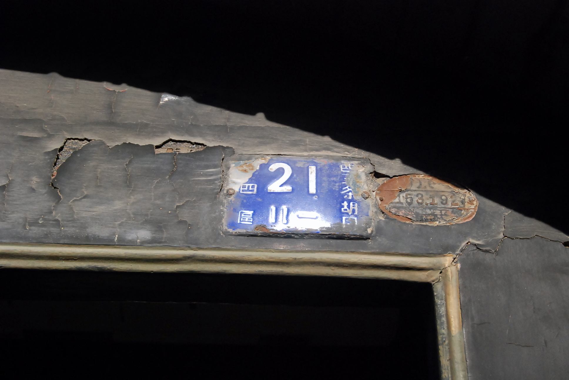 北京鲁迅故居门牌：西三条21号